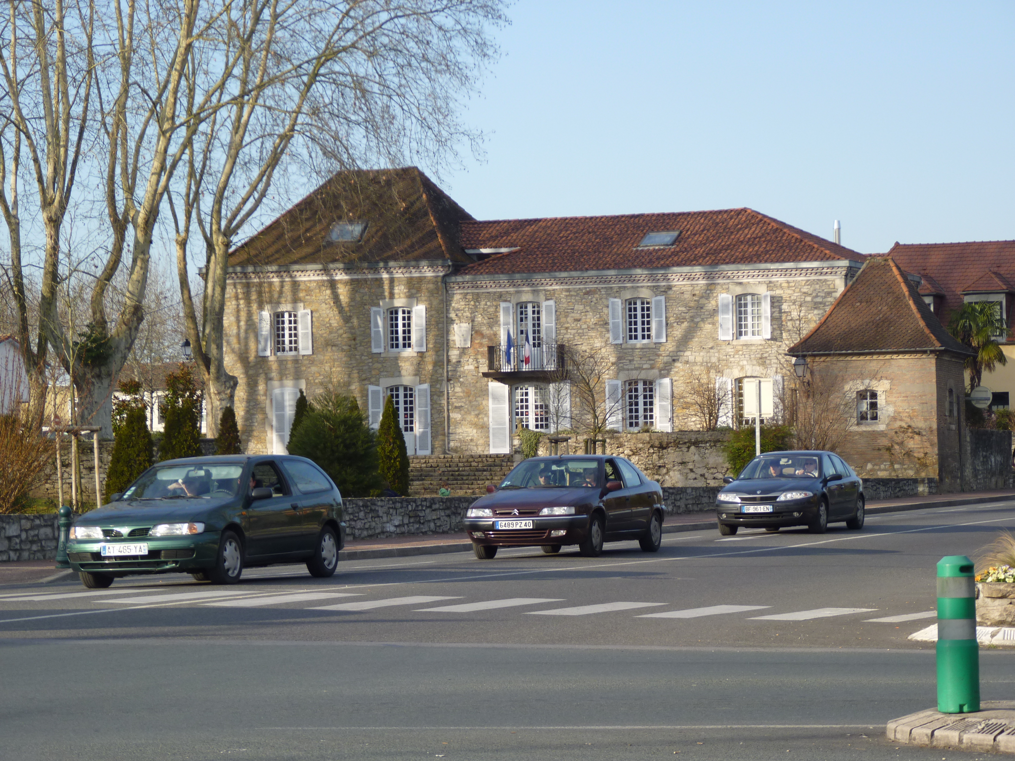 Marie de Saint-Paul-lès-Dax